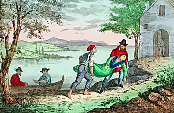 Annita portata al suo ultimo riposo - litografia, ridotto